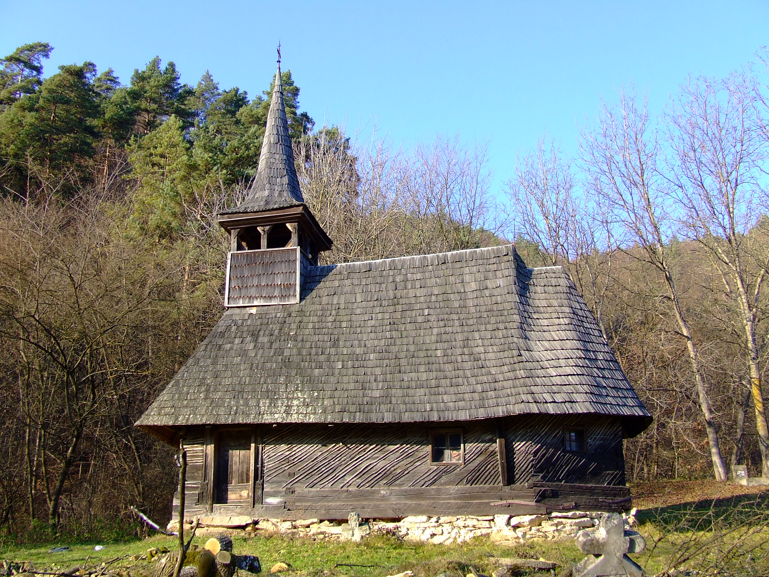 Biserica de lemn din Ileanda, Sălaj. Autor: Bogdan Ilieş Data: noiembrie 2006 Categorie:Biserici de lemn din Sălaj (imagini)